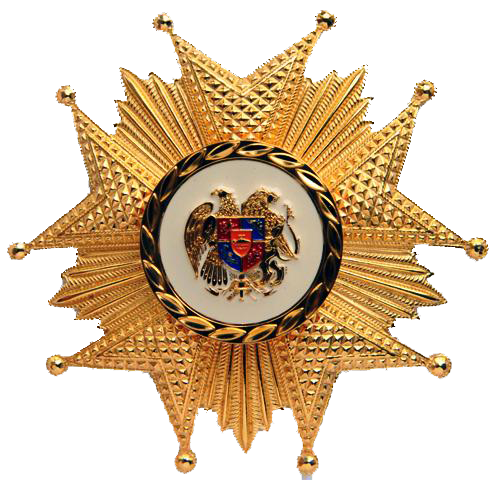 Орден Славы (Армения)